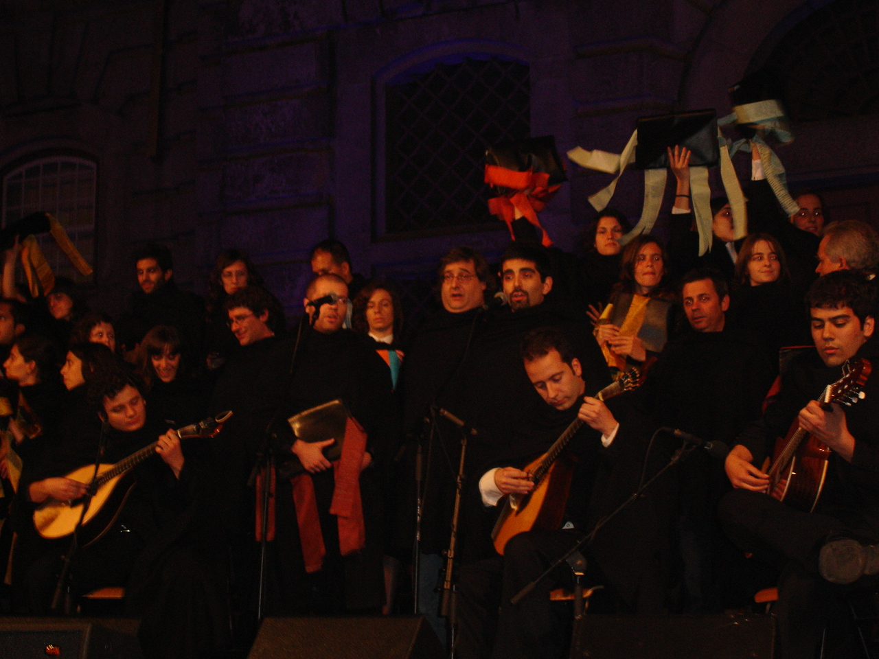 Monumental Serenata Porto 2008